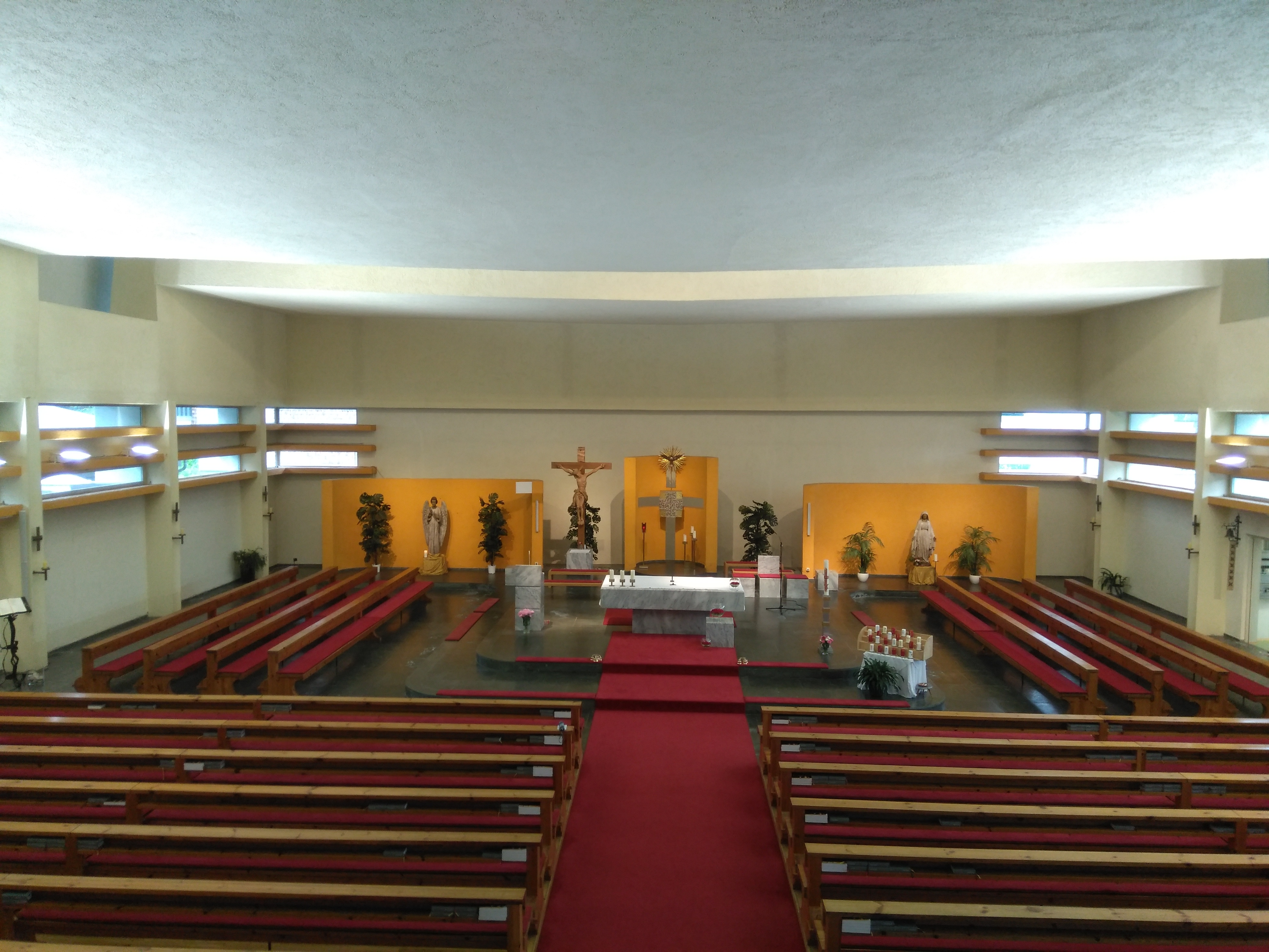 Blick von der Empore zum Innenraum der Pfarrkirche Absam-Eichat